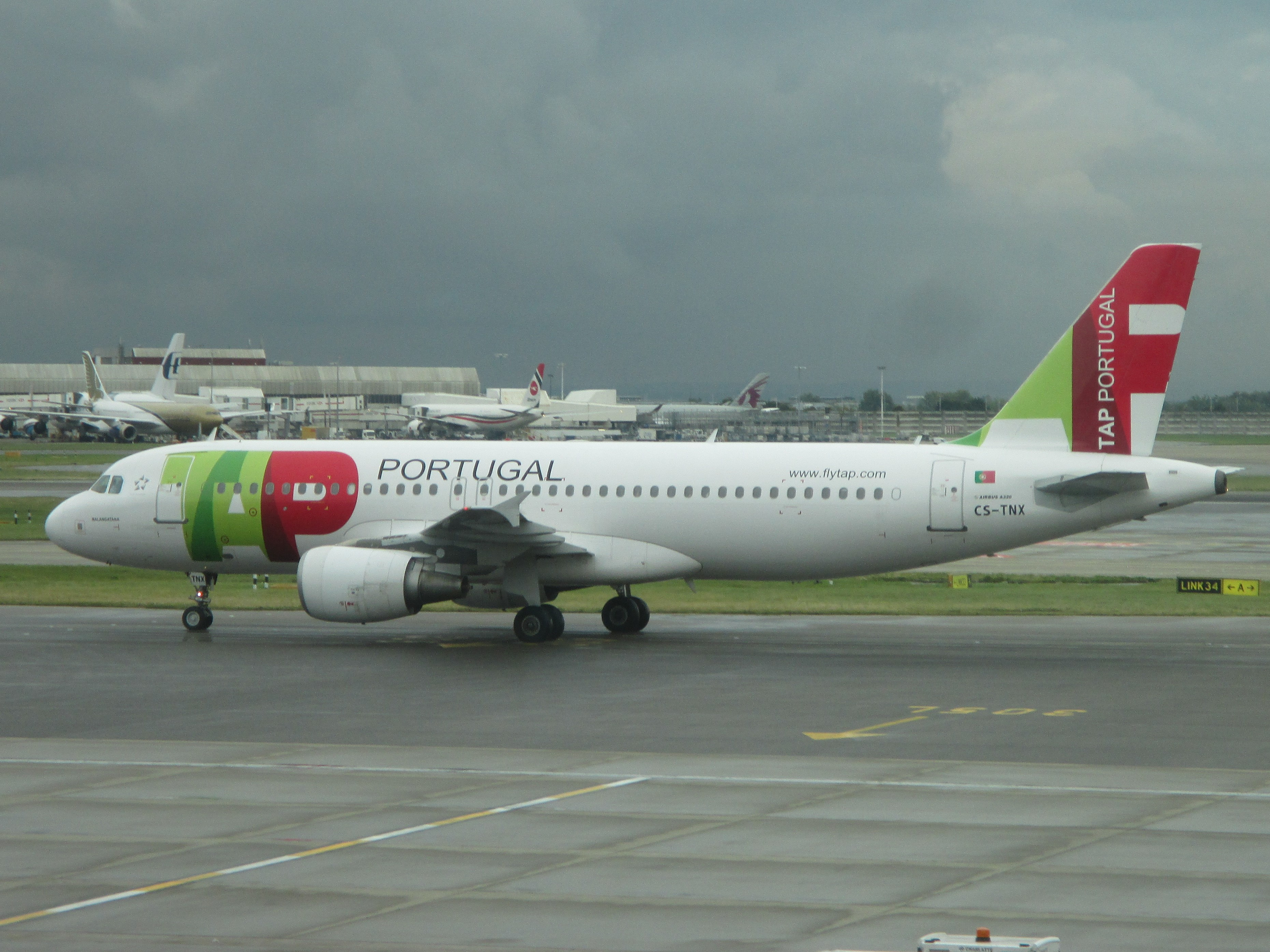 ロンドン・ヒースロー空港で撮影。